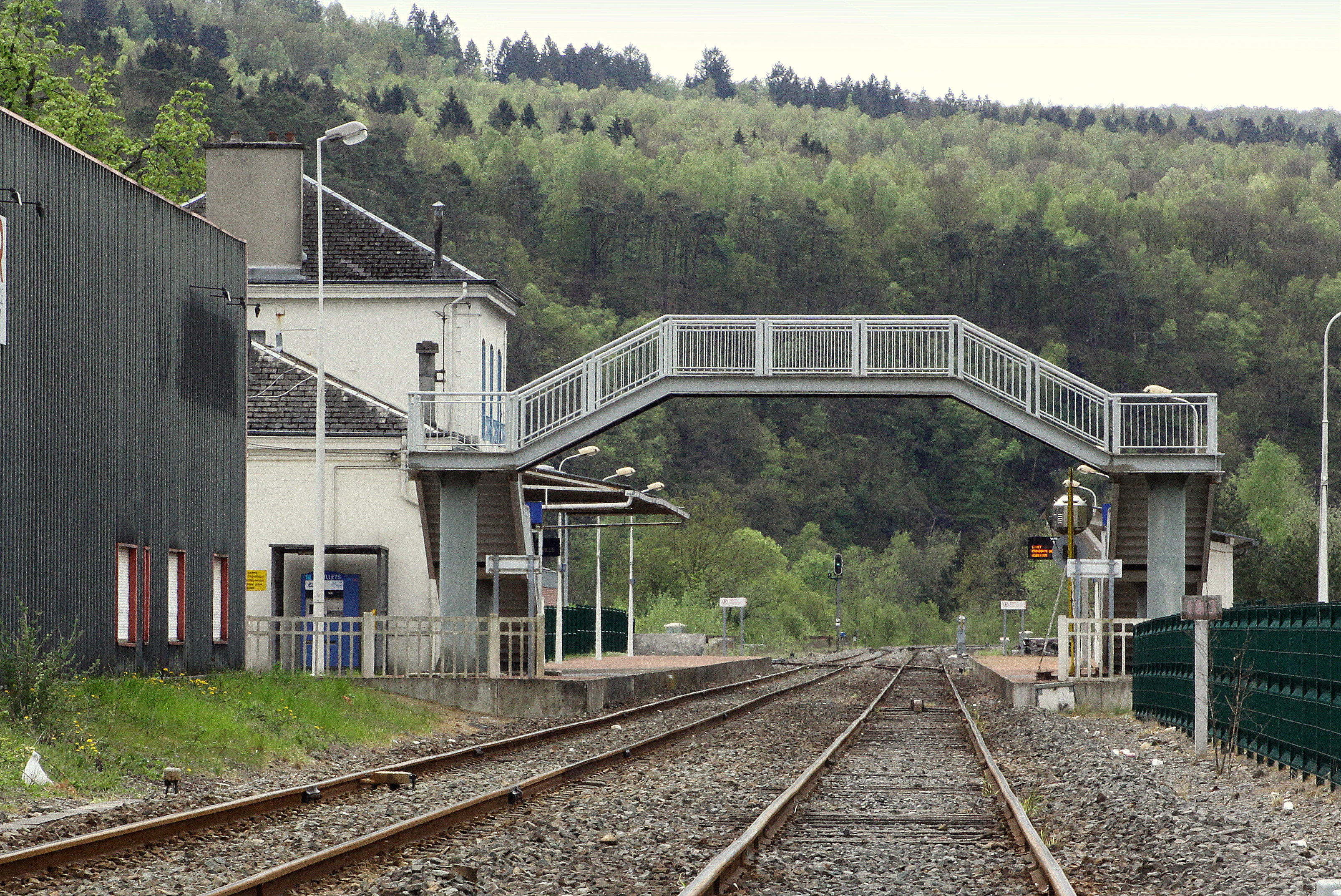 Gar vu Fumay. vue op d'Gleiser